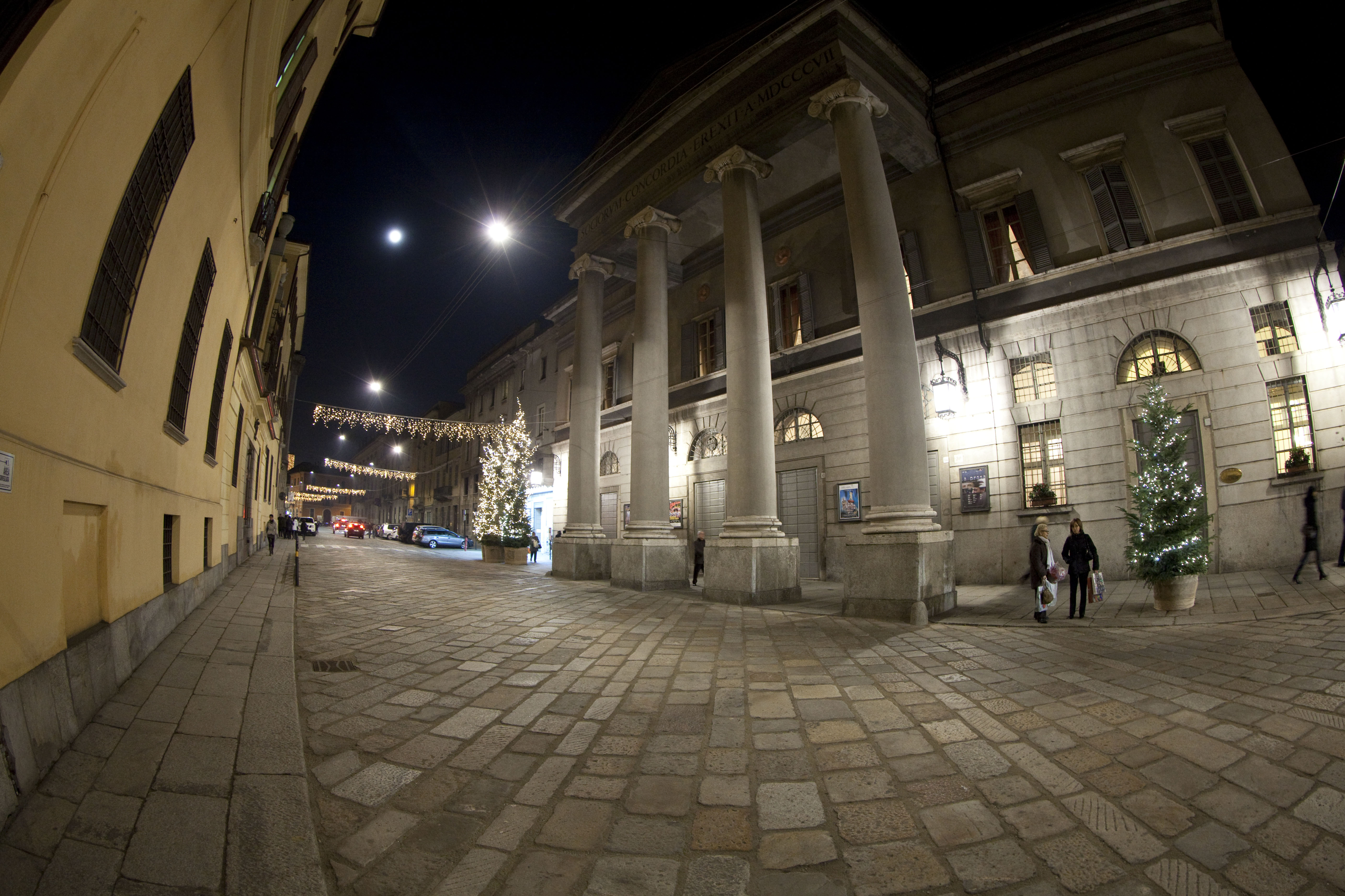 Teatro Ponchielli This is a photo of a monument which is part of cultural heritage of Italy.